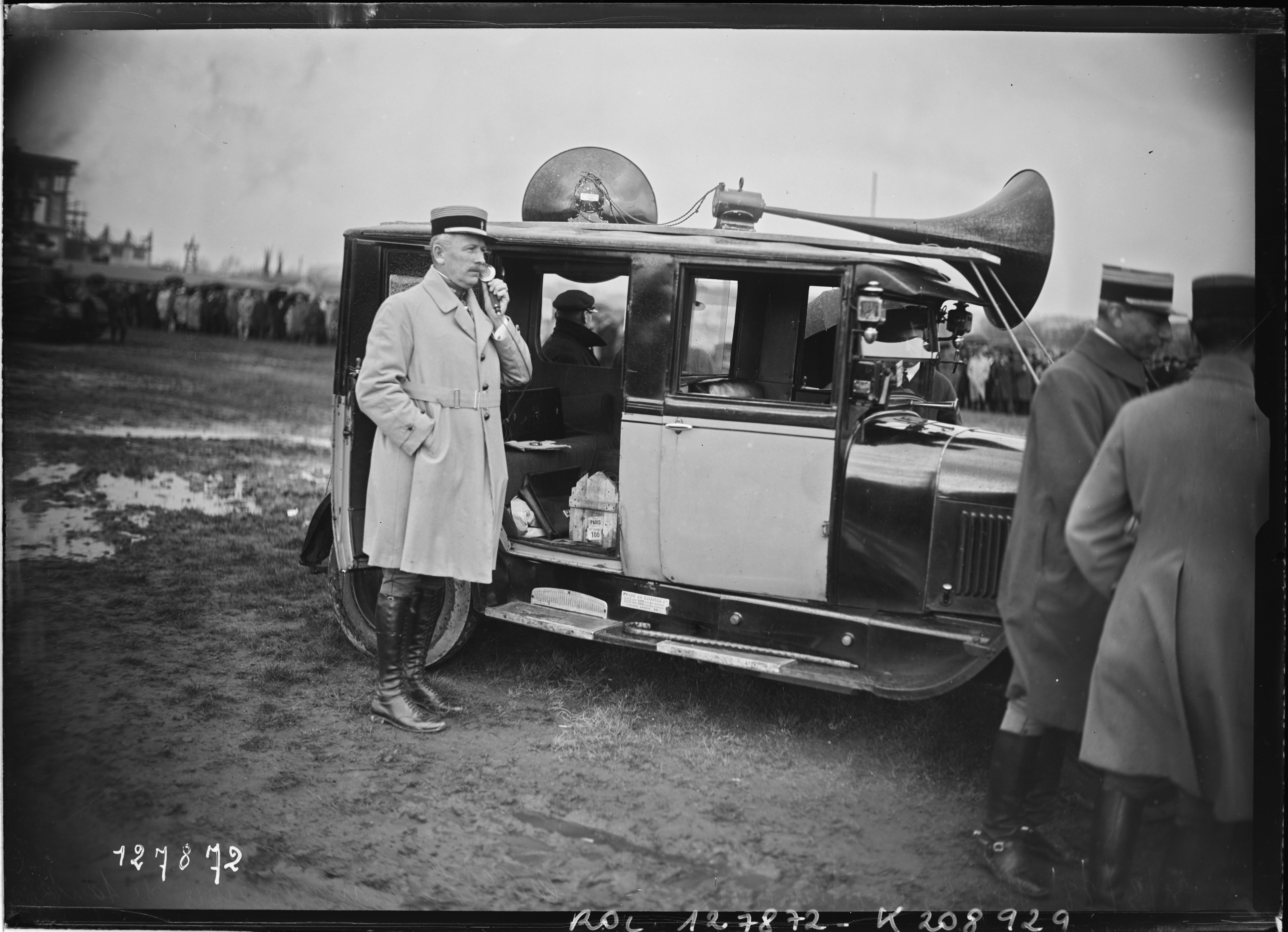 31/3/28, Issy-les-Moulineaux, le colonel Frère, manoeuvres de tanks : [photographie de presse] / [Agence Rol]